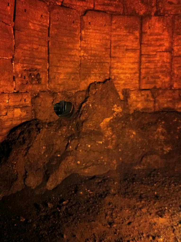 Dolní oblast Vítkovice, pohled do vysoké pece číslo 1